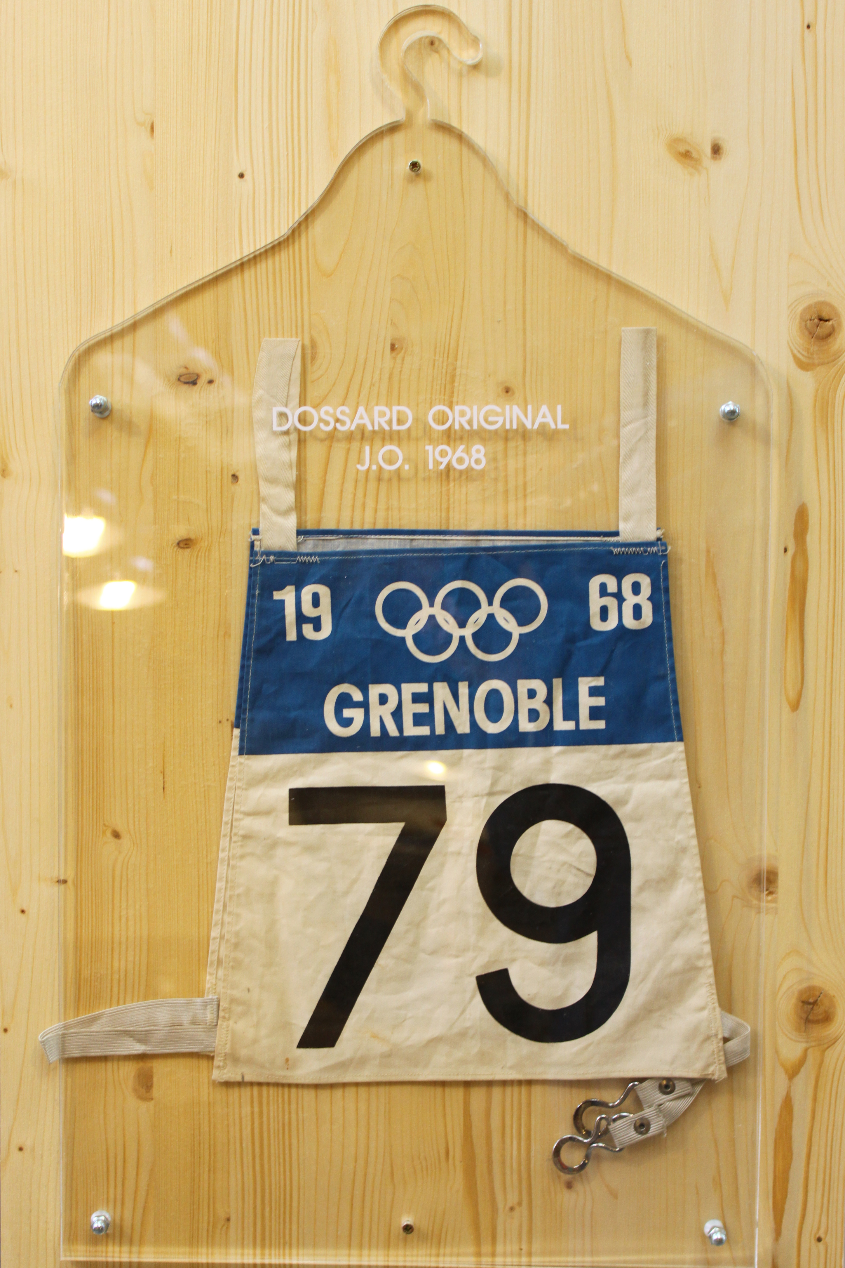 Dossard n°79 utilisé pendant les Jeux olympiques d'hiver de 1968